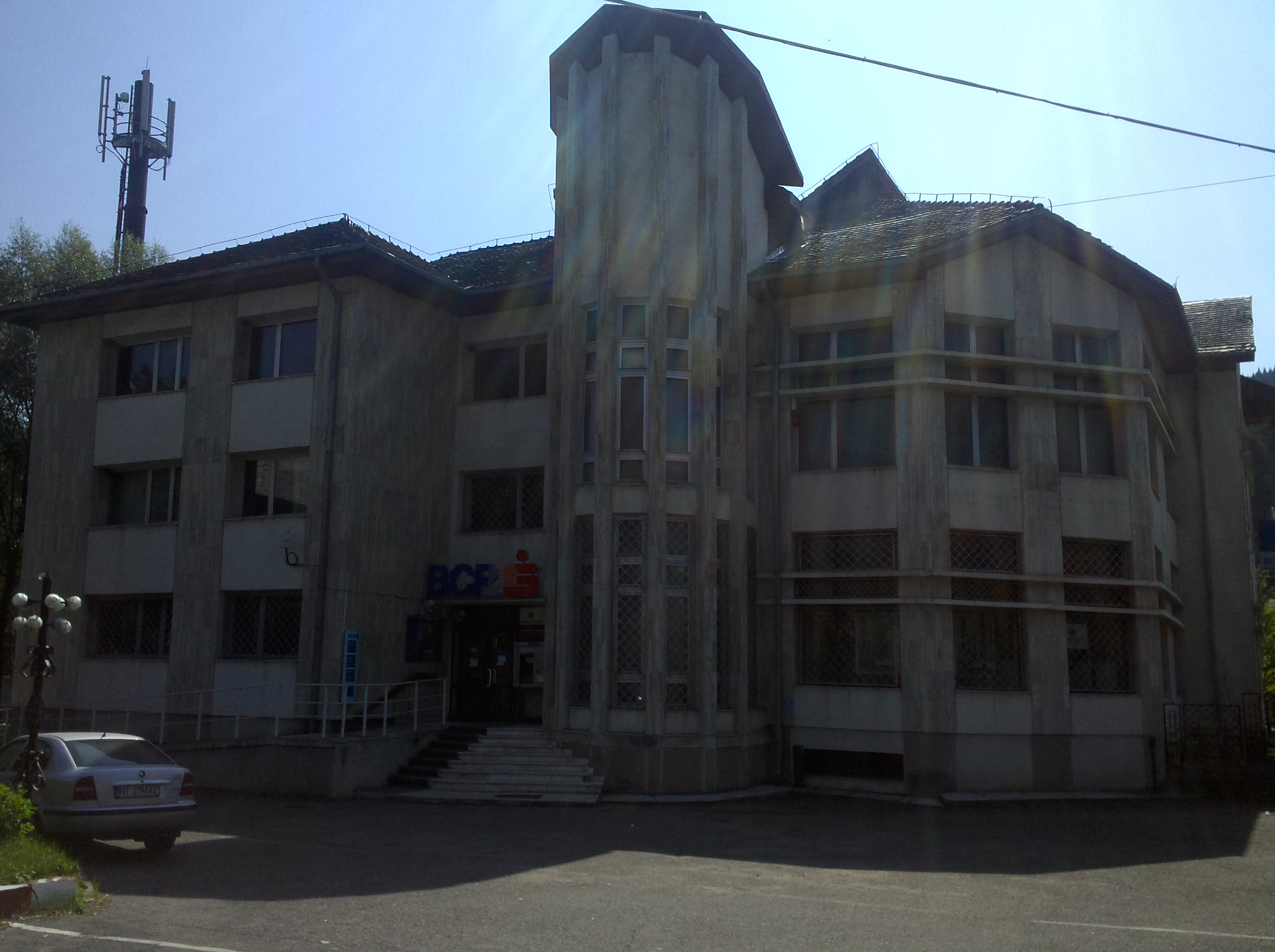 Una caixa en la ciutat romanesa de Bicaz